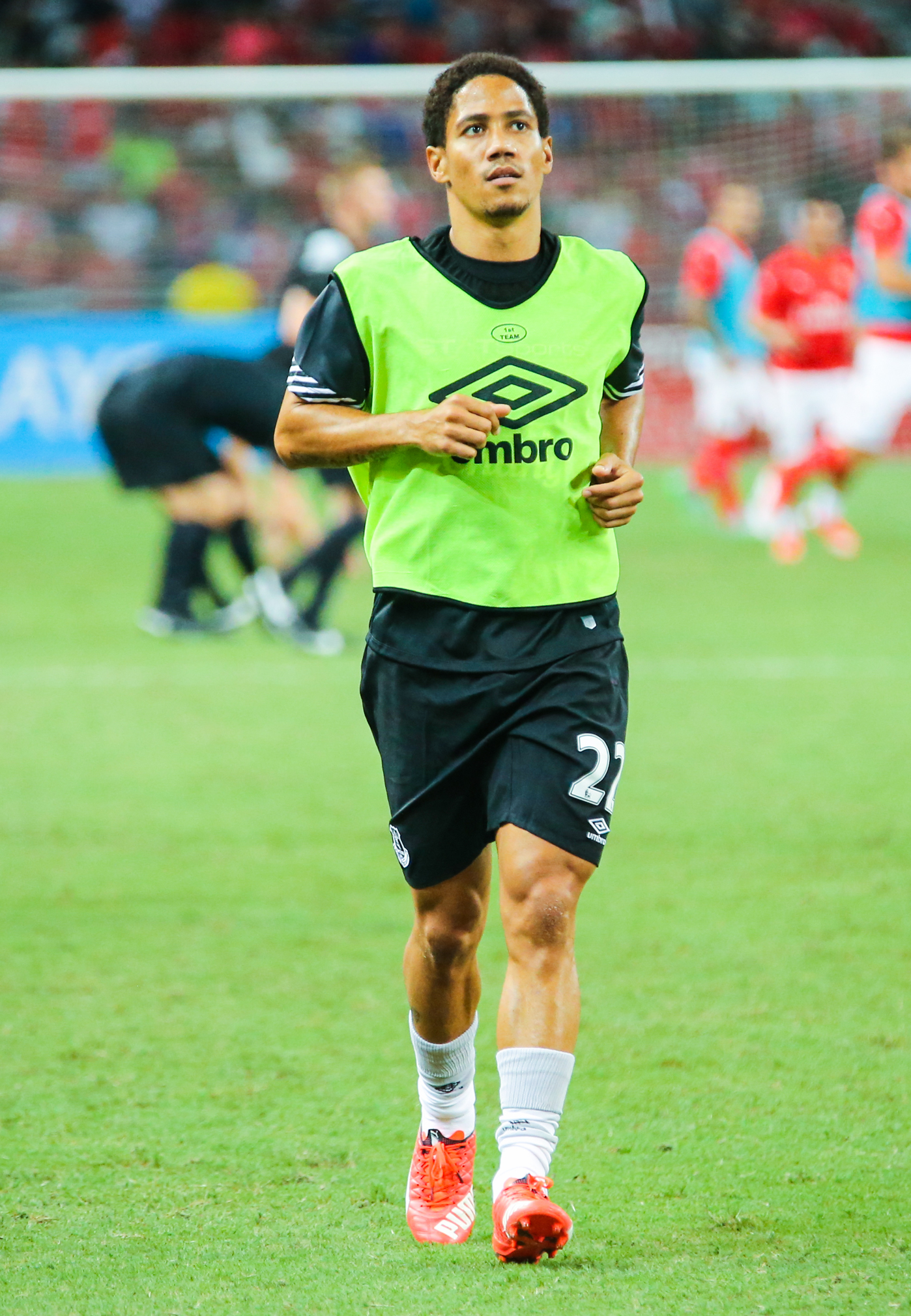 Steven Pienaar warming-up for Everton in 2015.